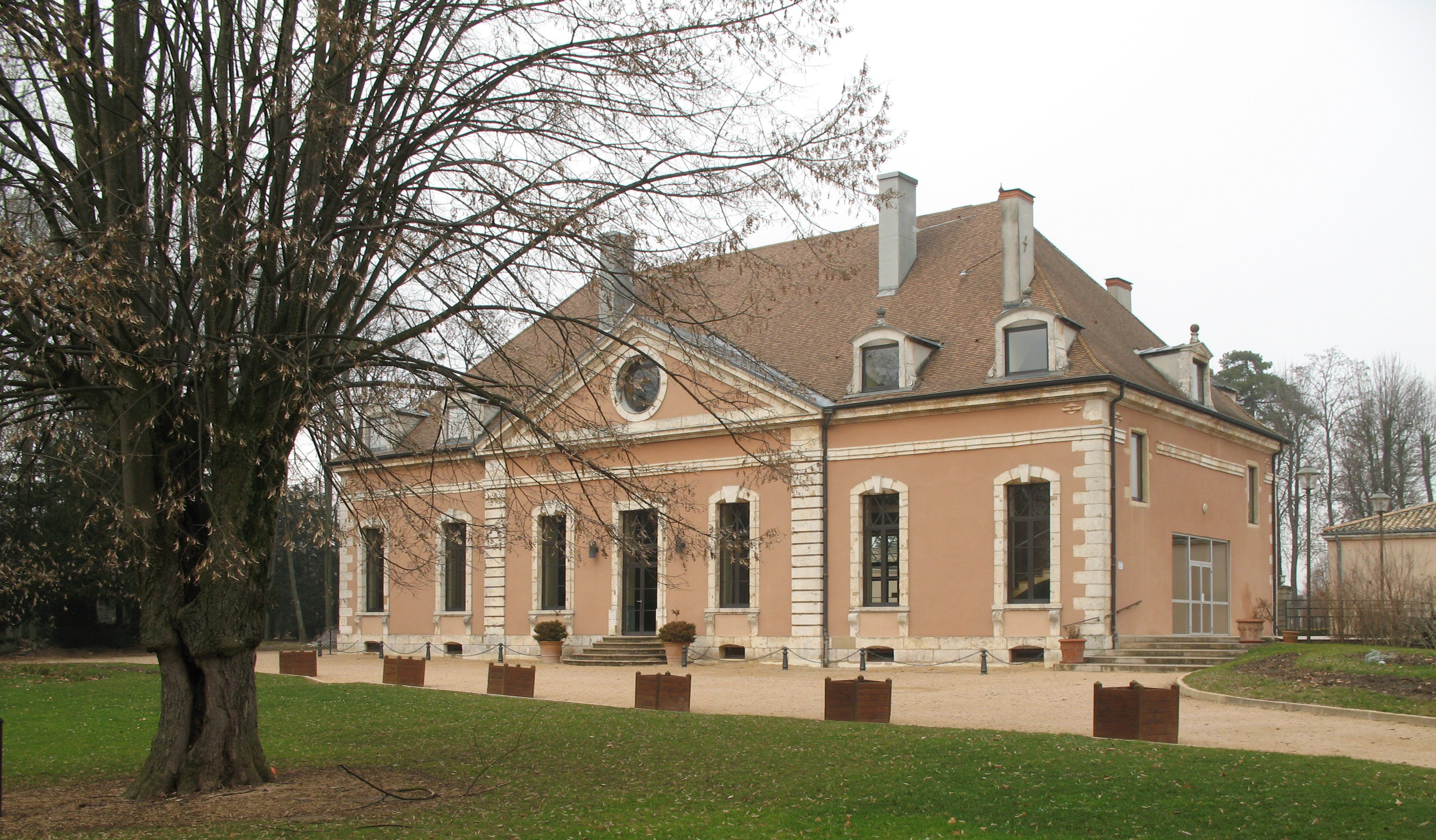 château d'Hurigny (Saône-et-Loire)